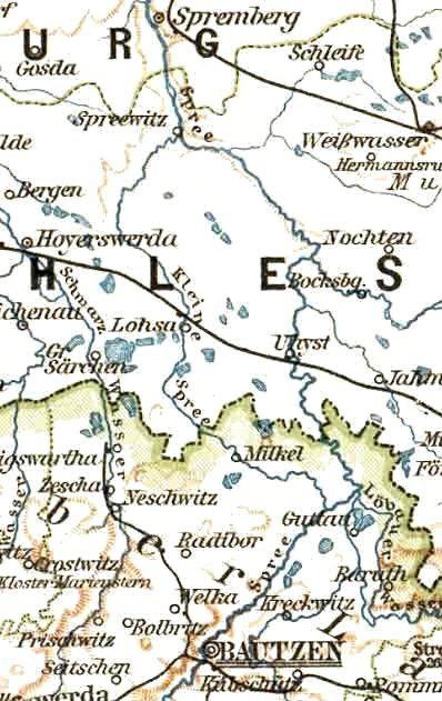 Verlauf der Spree zwischen Bautzen und Spremberg mit der Kleinen Spree auf einer Karte des Königreiches Sachsen von 1895.